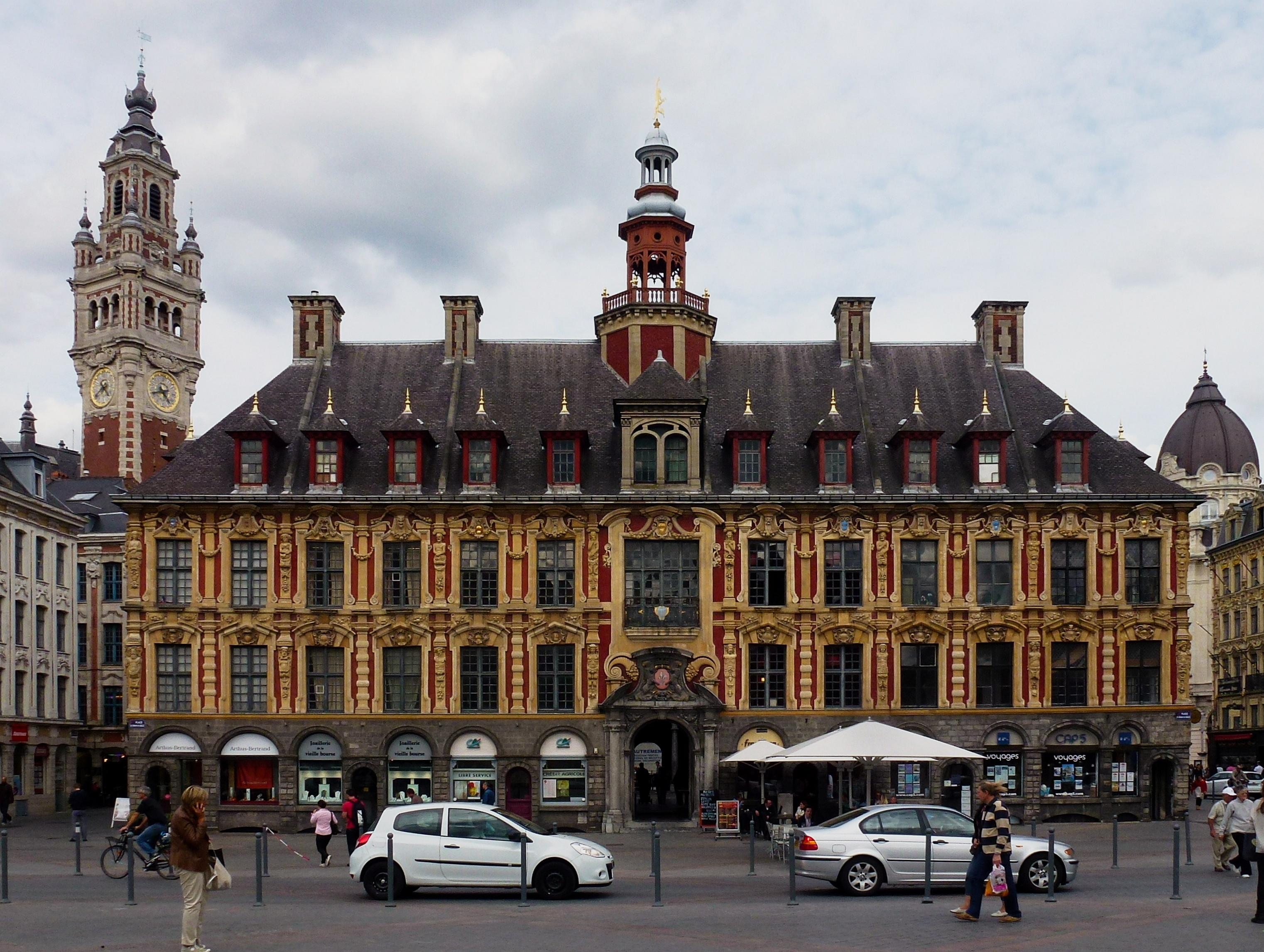 Vieille Bourse à Lille Nord (département français) .